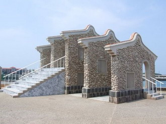 造型獨特的觀景樓